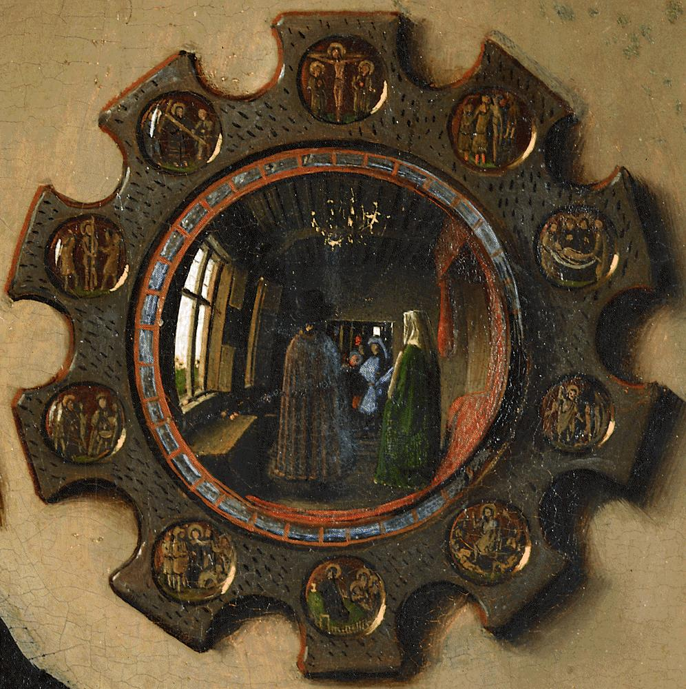 detail